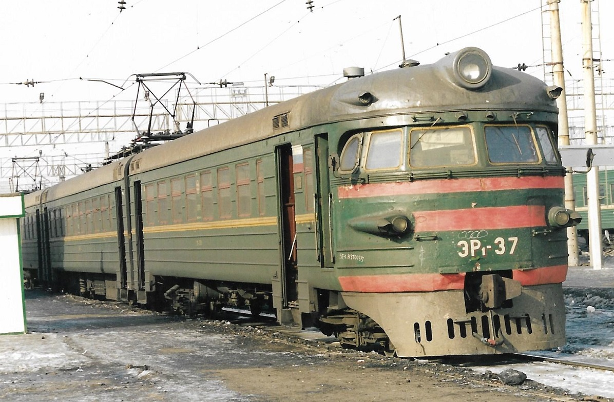 Построен в десятивагонной составности С завода поступил в депо Москва-Октябрьская В 1972 г. передан в депо Юдино В 1976 г. передан в депо Казань В конце октября 1985 г. передан в депо Пермь-2 В начале февраля 1991 г. передан в депо Нижний Тагил В 2001 г. передан в депо Свердловск-Пассажирский В 2005 г. передан в депо Пермь-2 (По данным сайта "Российские электропоезда")